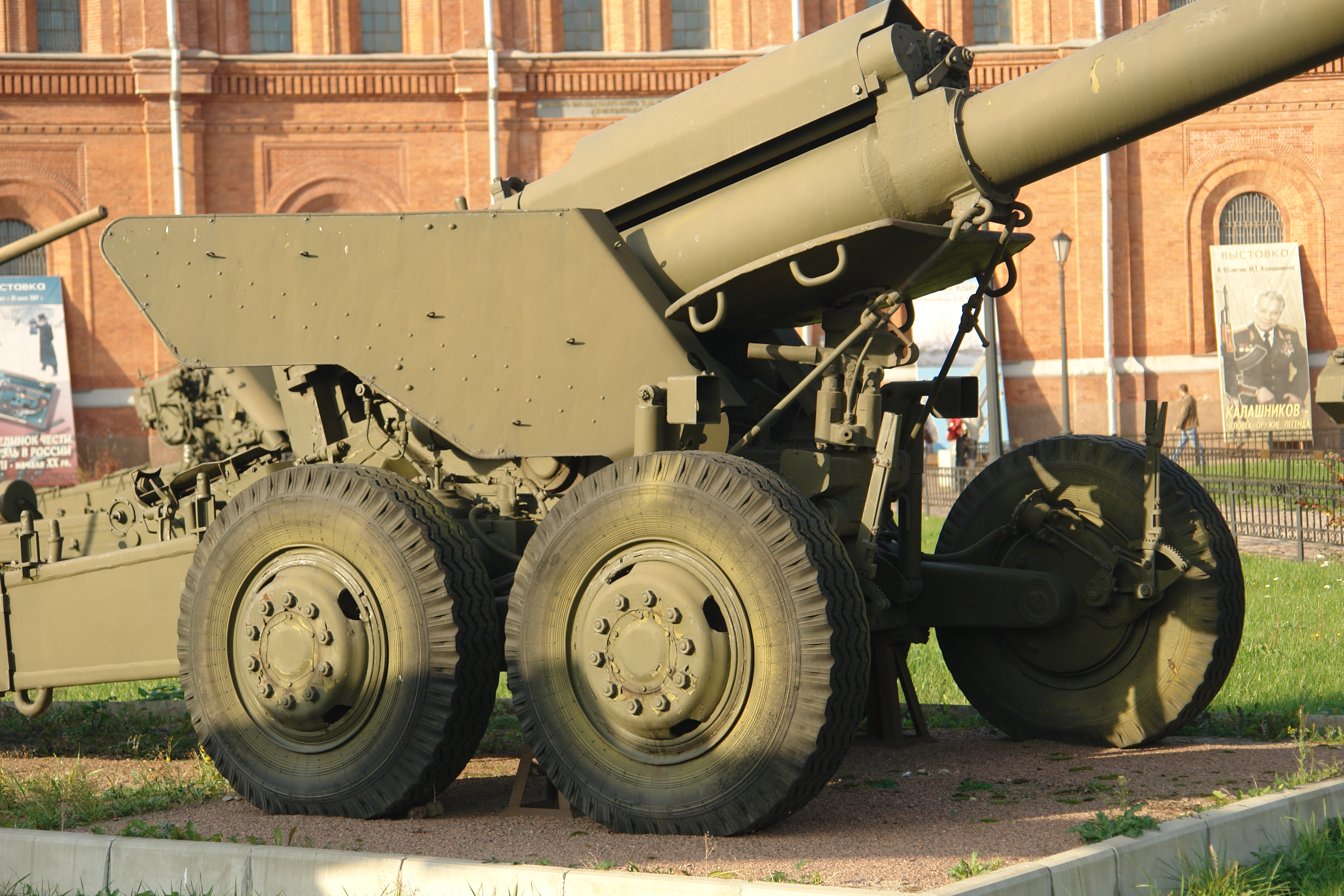 152-мм пушка 2А36 «Гиацинт-Б» (1979). Главный конструктор Ю.Н. Калачников. Дальность стрельбы, м - 27500, активно-реактивным снарядом - 32820. Скорострельность - 5-6 выстр/мин. Масса, кг: орудия - 9760, снаряда - 46. Расчет - 8 человек. Военно-исторический музей артиллерии, инженерных войск и войск связи, Санкт-Петербург.